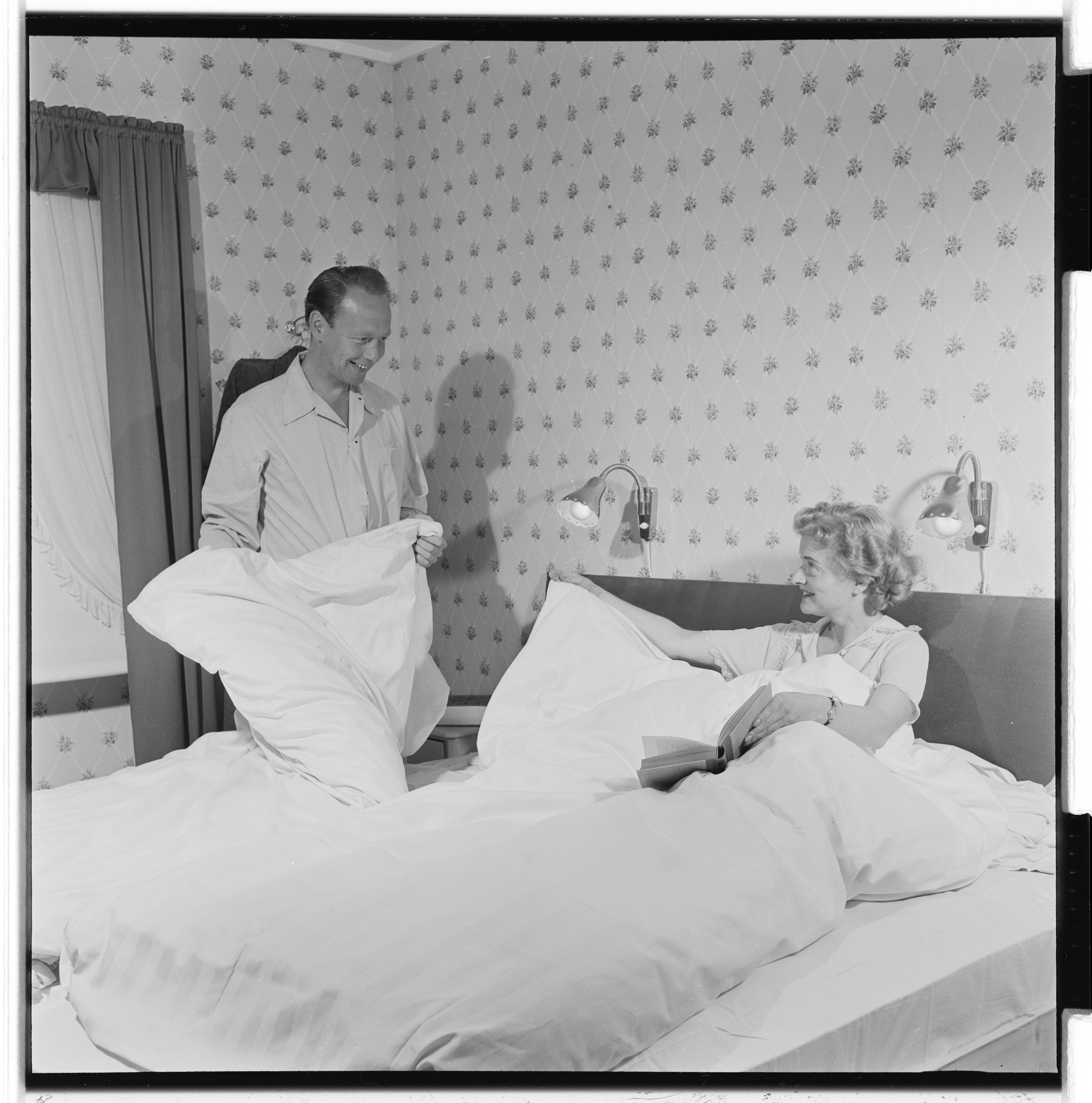 Bildet er hentet fra Arkivverket. Laken-annonse Dale. Arne Lie og frue Arkivinstitusjon : Riksarkivet Arkivnavn : Billedbladet NÅ Sted : Norge, Ukjent, Ukjent, Emneord: Reklame, Annonse, Laken, Skuespillere Avbildet: Lie, Arne;Lie, Irene Thomsen